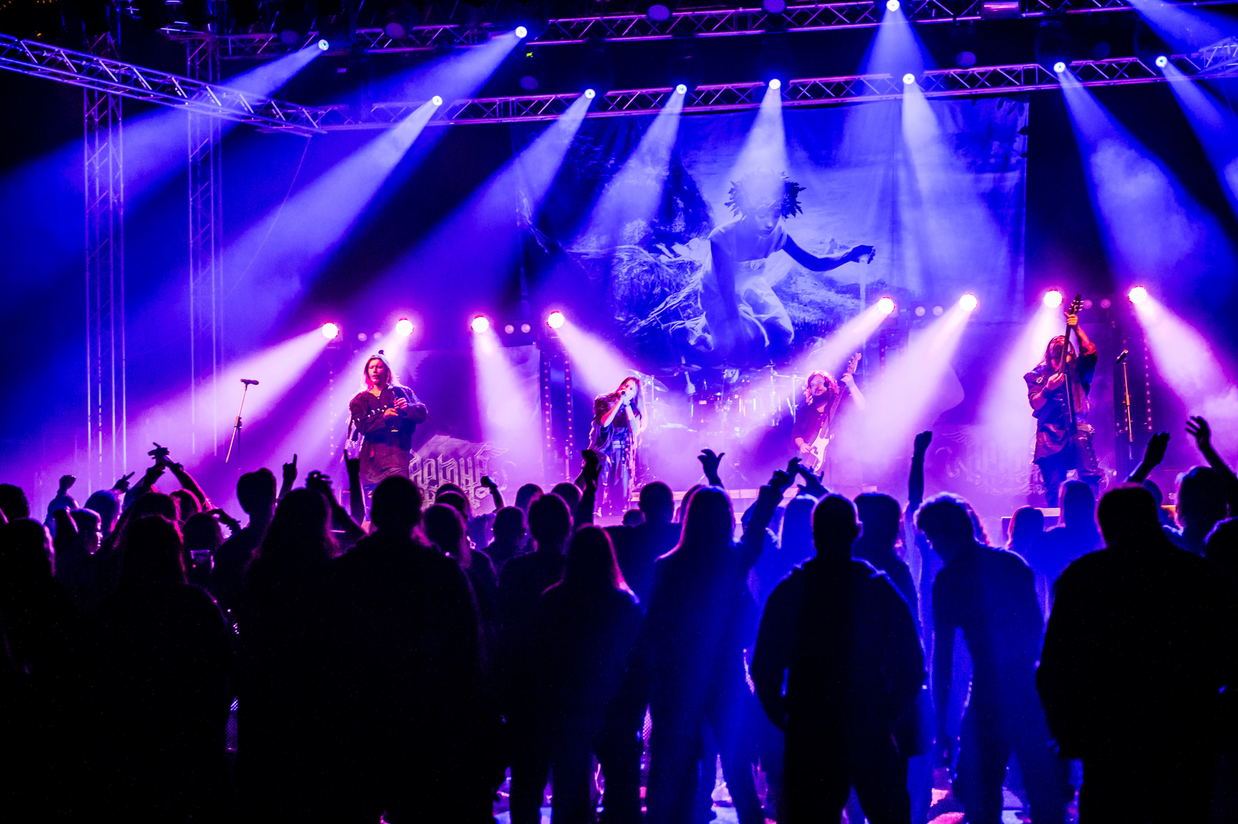 'Arkona - Ruhrpott Metal Meeting 2015 - Oberhausen'